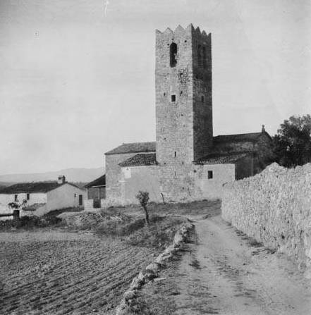 Imatge